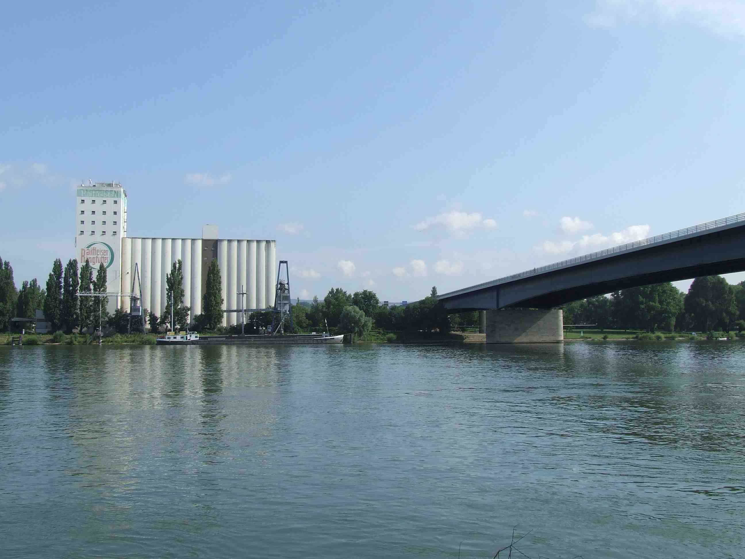 Schiersteiner Brücke